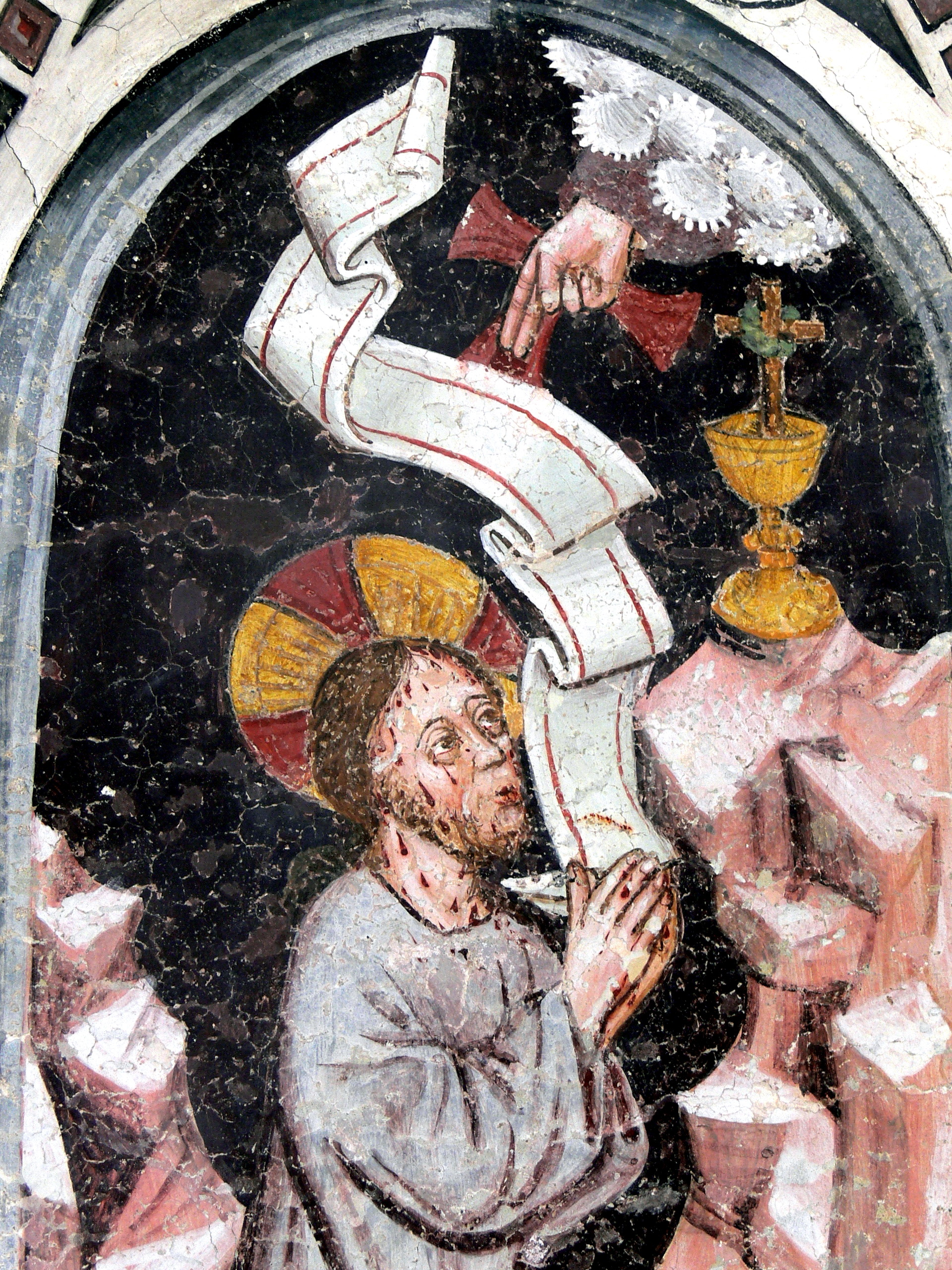 Tabernakelbildstock in Taisten. Christus am Ölberg